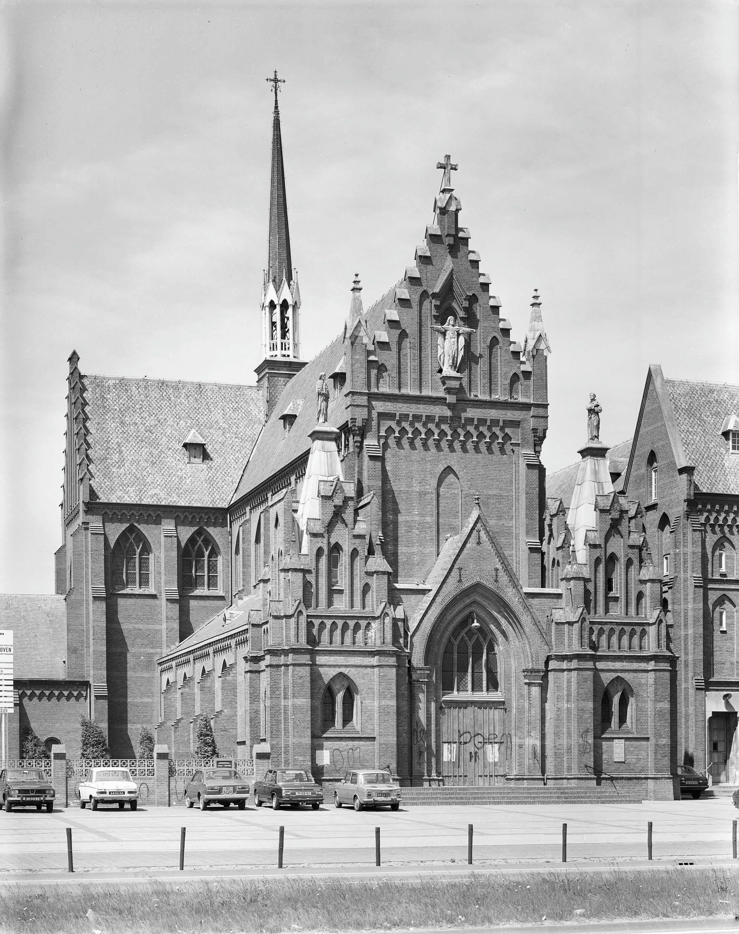 Franciscanerklooster: voorgevel kerk